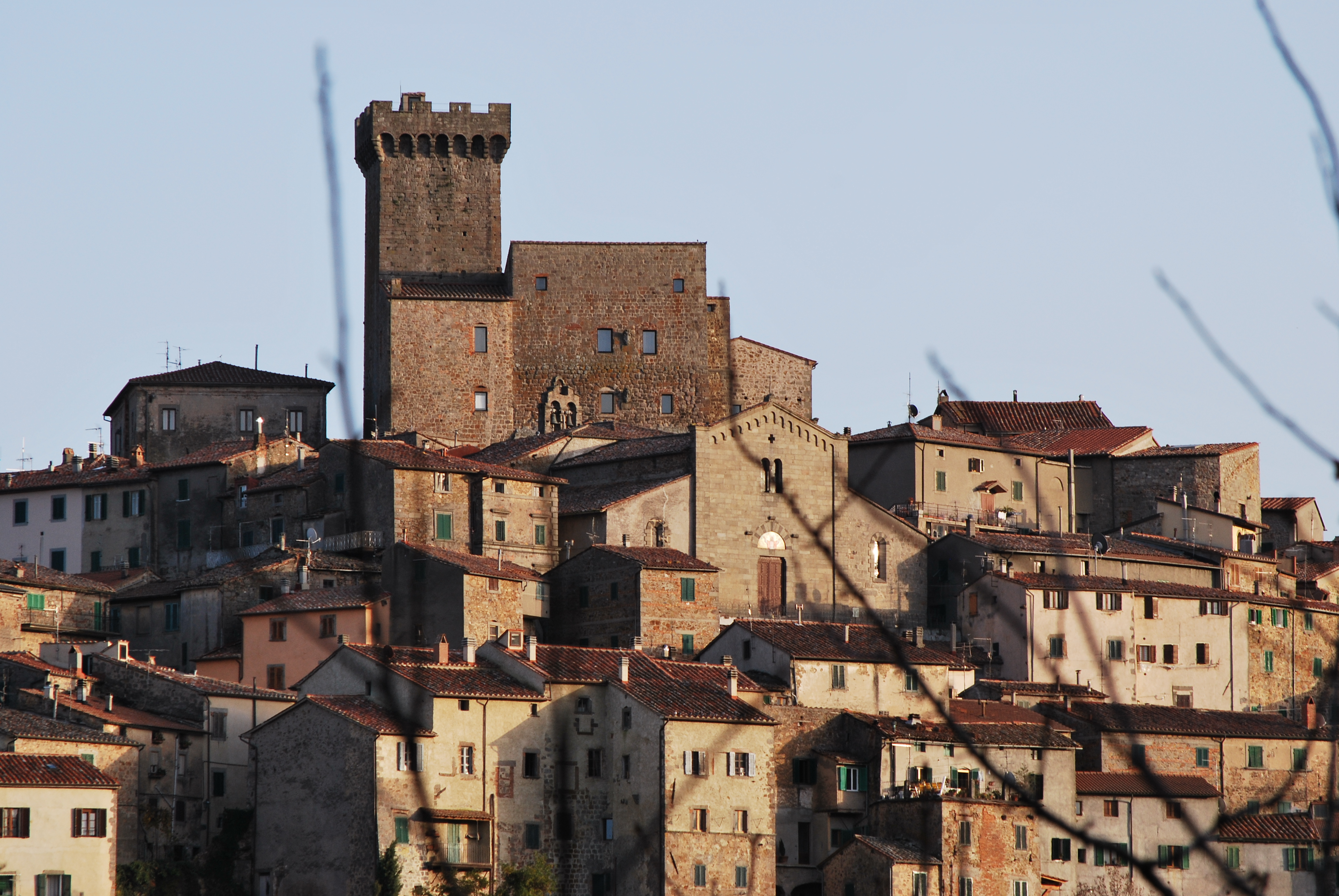 panorama autunnale di Arcidosso